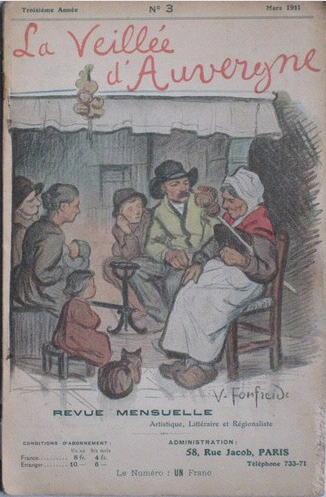 La Veillée d'Auvergne, frontispice de Victor Fonfreide (1872-1934)